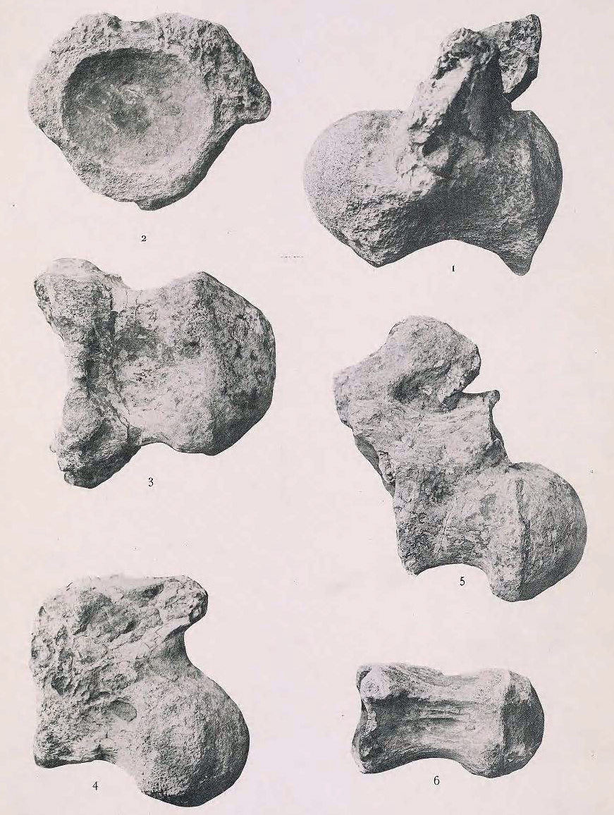 Neuquensaurus australis (originally Titanosaurus) holotypic caudal vertebrae.